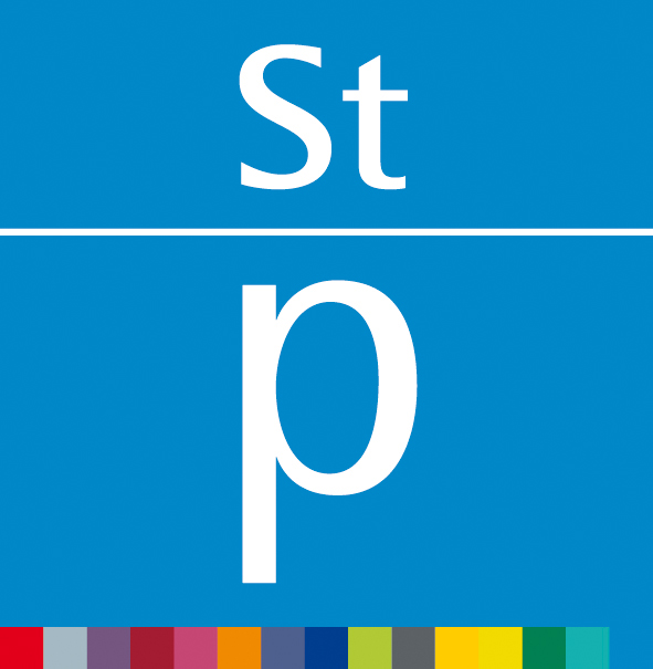 Logo des Staatspreises für Archi0tektur des österreichischen Bundesministeriums für Wirtschaft, Familie und Jugend